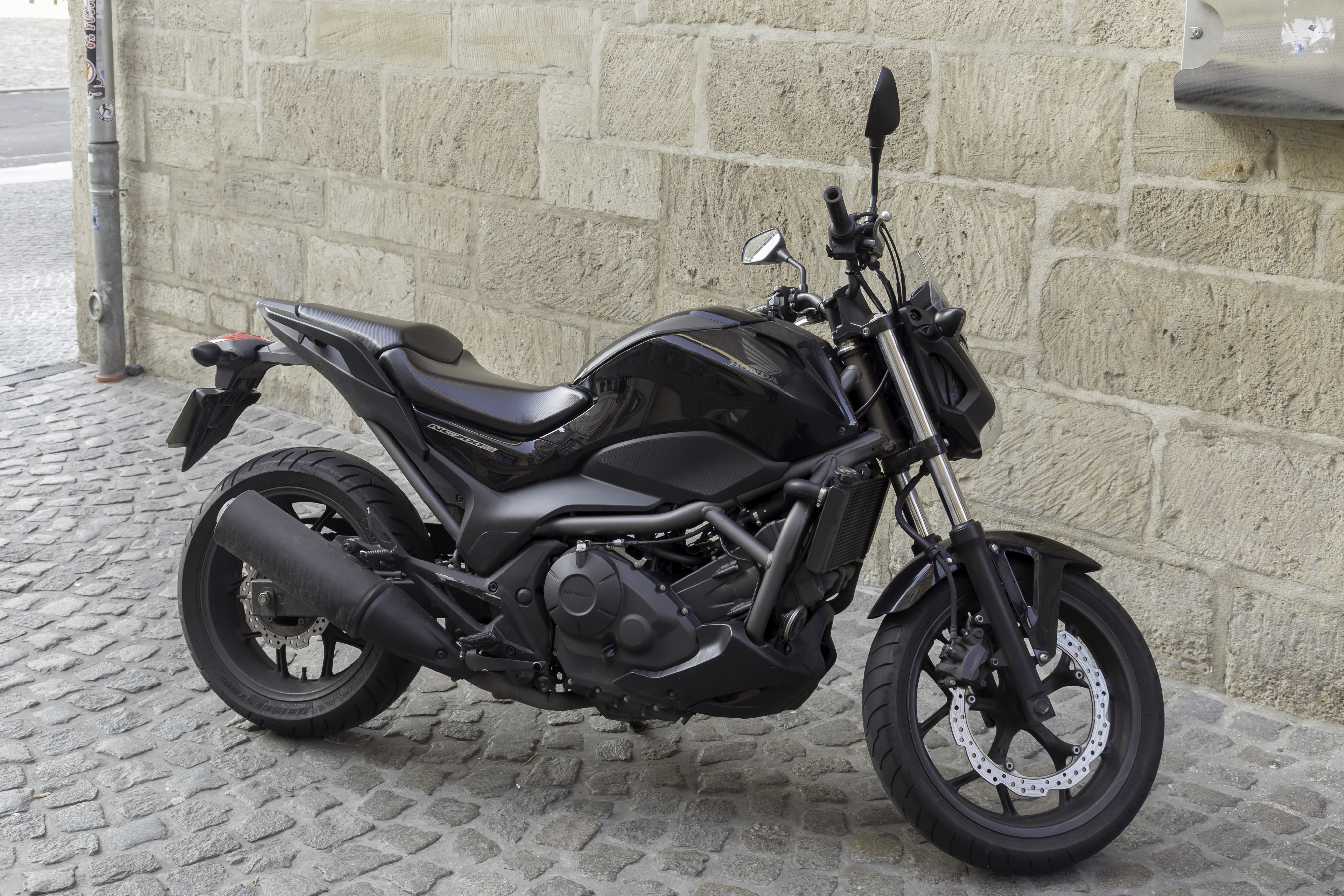 Cooles Honda Bike NC700S - in der Altstadt Halle Saale / Salzgrafenstraße - An der Marienkiche / Marktkirche